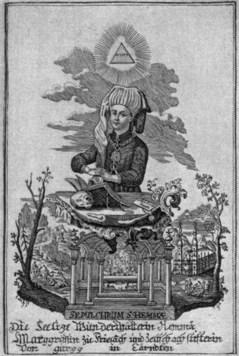 Andachtsbild, Kupferstich/copper engraving, H 15 x B 10 cm, Mitte 18. Jahrhundert/18. century